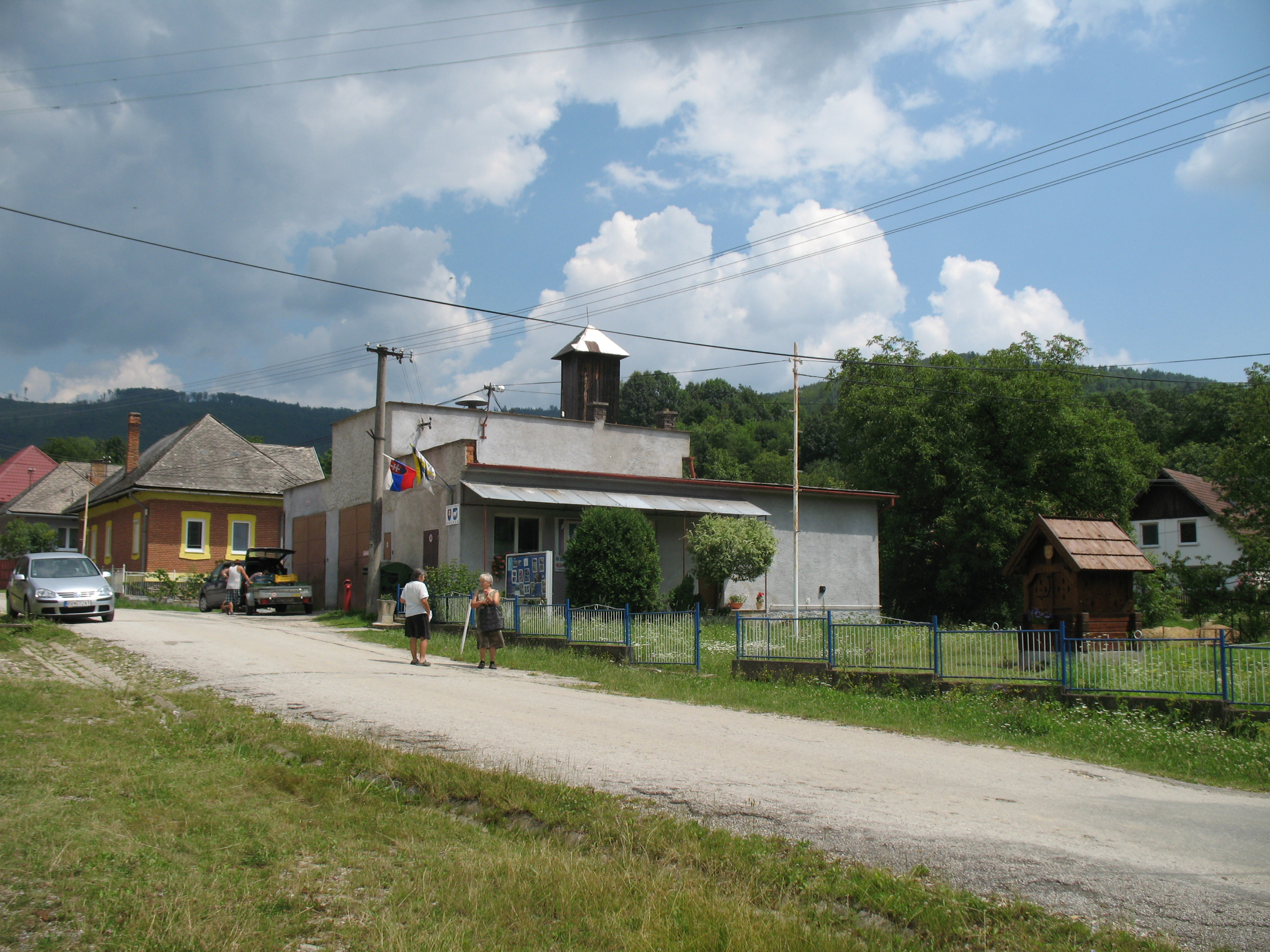 Gócs falu